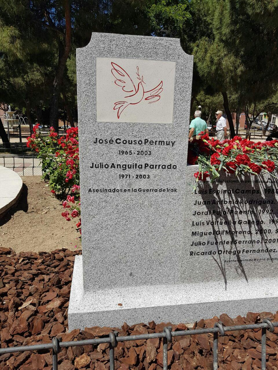 La concejala presidenta en funciones del distrito de Ciudad Lineal, Yolanda Rodríguez, ha acompañado hoy en la inauguración del “Jardín de José Couso Permuy y Julio Anguita Parrado”, donde se ha instalado un monolito que recuerda a los periodistas españoles asesinados en conflictos bélicos. En este homenaje han participado también familiares de José Couso y Julio Anguita.